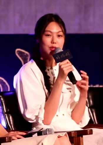 (TV TEN) 아가씨 제작보고회 - 김민희♡김태리 애정 가득 아가씨 커플